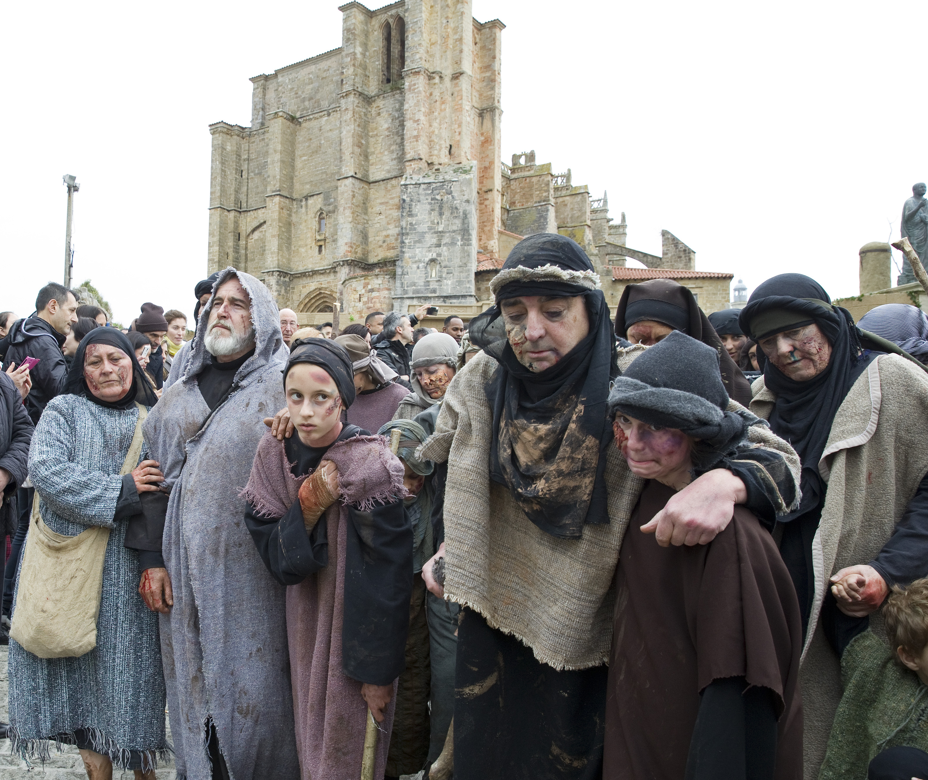 El presidente de Cantabria, Miguel Ángel Revilla, asiste a la representación de La Pasión Viviente, Fiesta declarada de Interés Turístico Nacional.